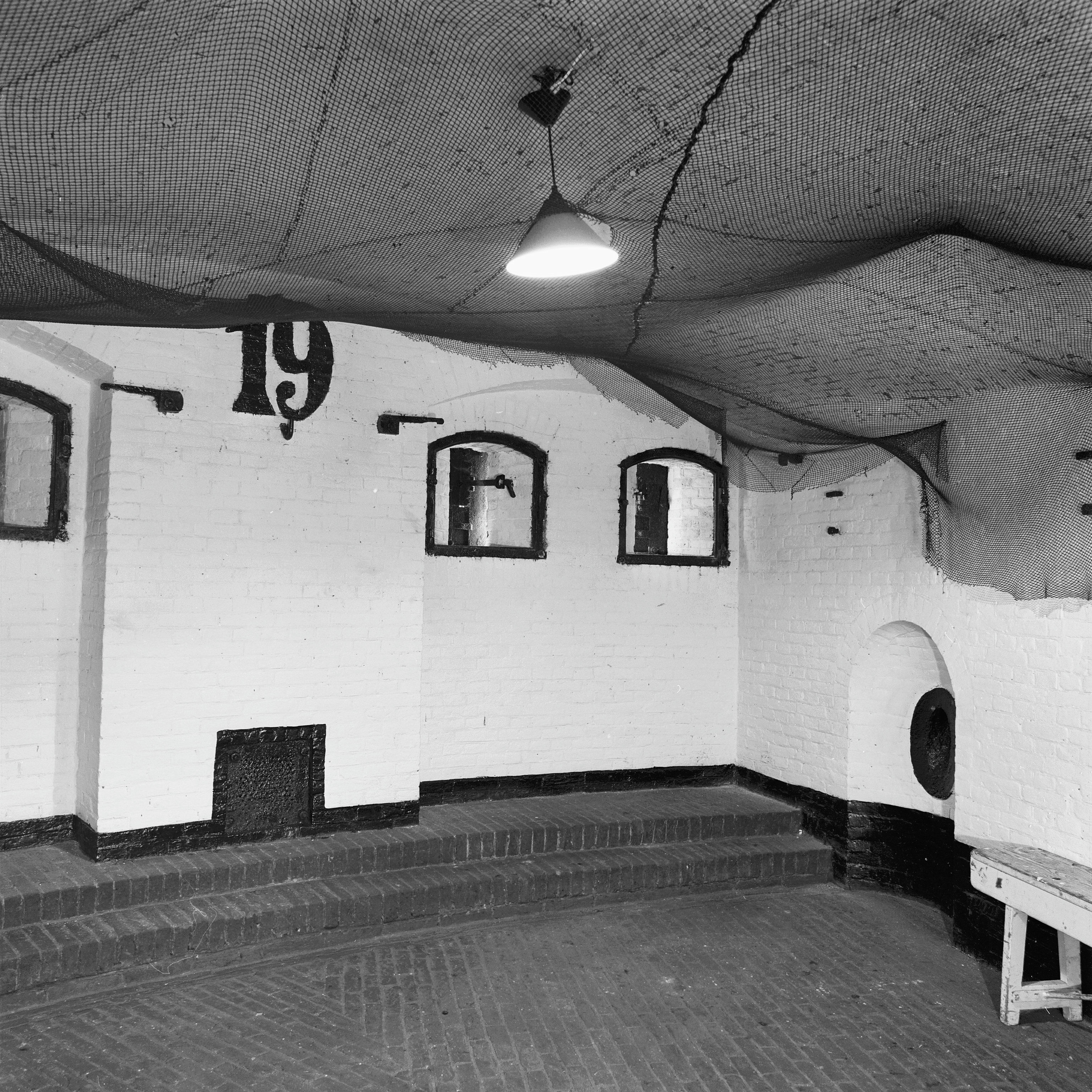 Vestingwerken: westbatterij, interieur